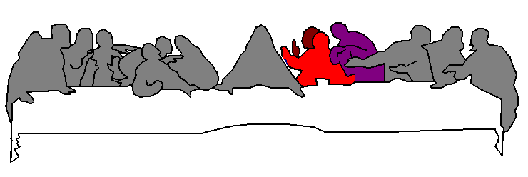 Last supper by Leonardo da Vinci